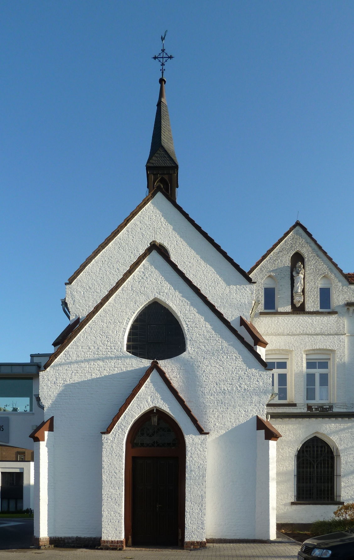 Neugotische Krankenhauskapelle in Geilenkirchen